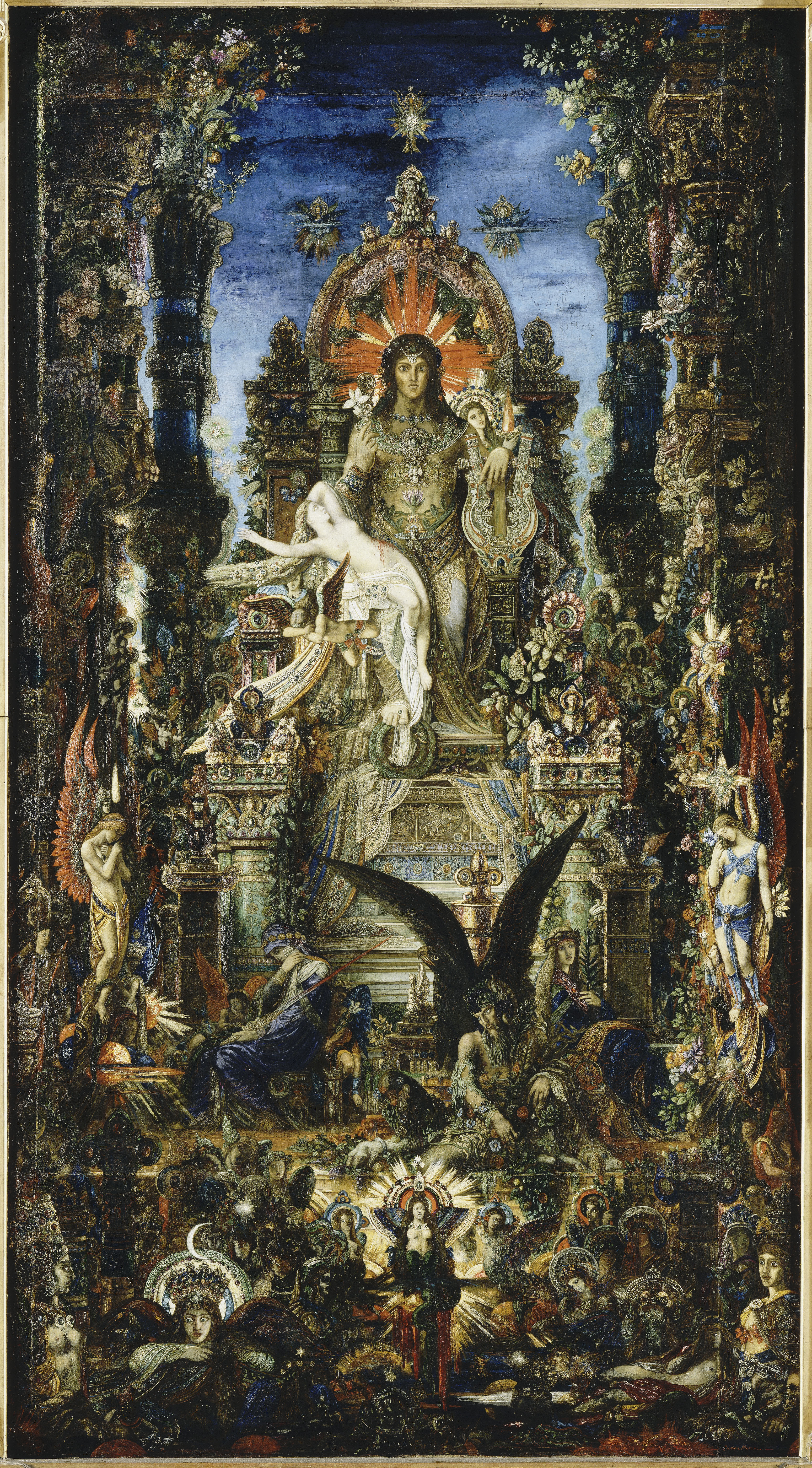 Joconde database: entry 50410004307